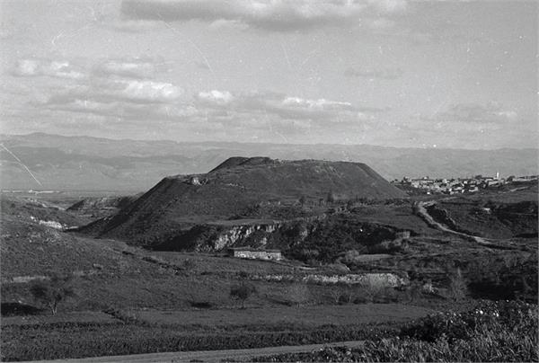 בית שאן - מראה